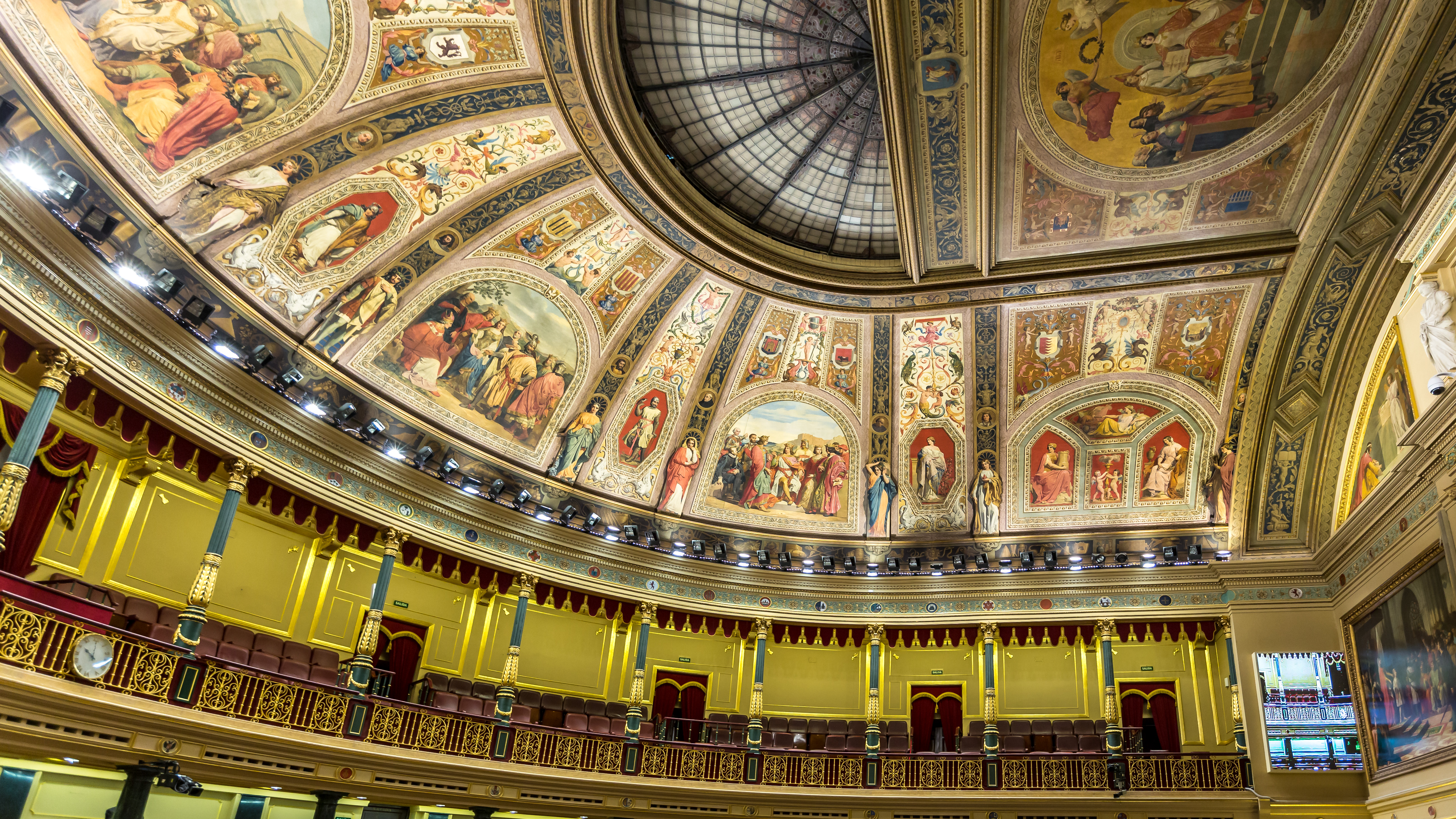 Hemiciclo del Congreso de los Diputados, Madrid.